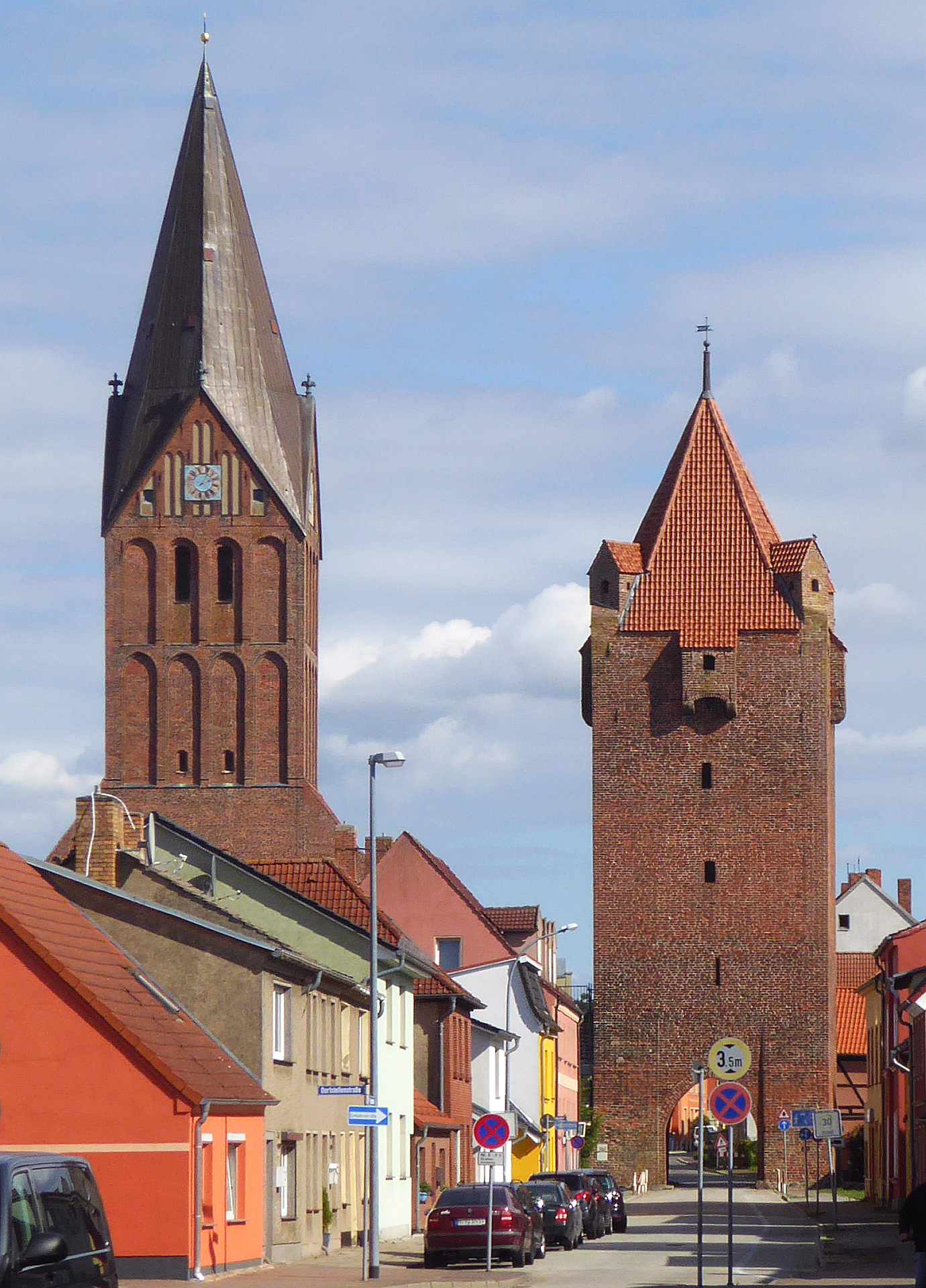 Barth mit Dammtor und Turm der St-Marien-Kirche beide 15. Jh - Foto Wolfgang Pehlemann P1260042.jpg